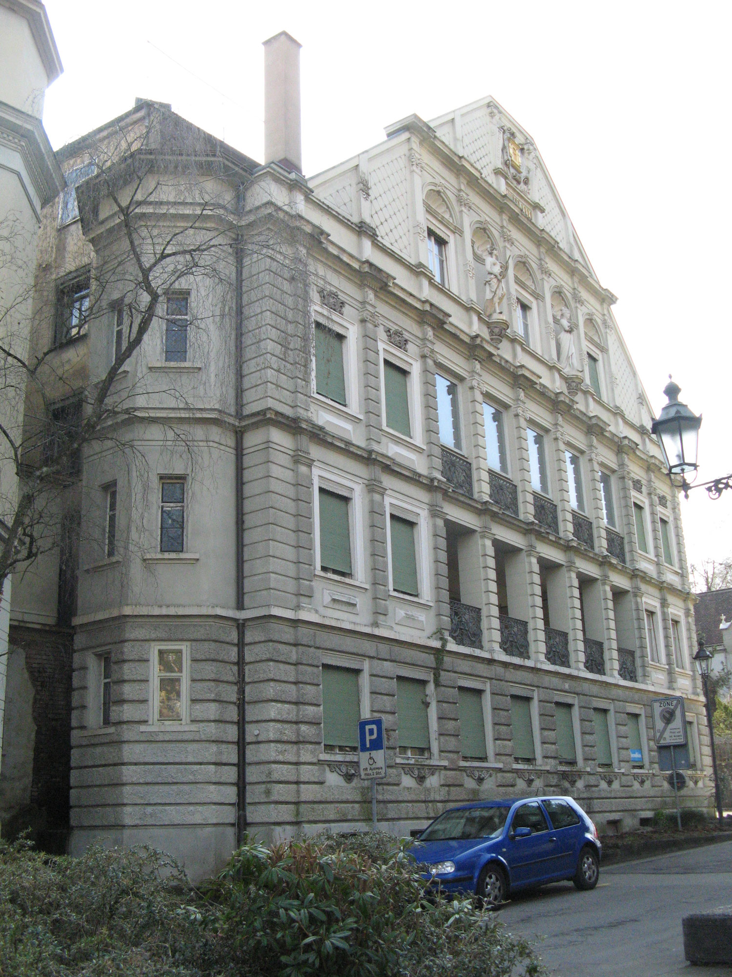 Rückseite des Hotels "Bären" im Bäderquartier von Baden